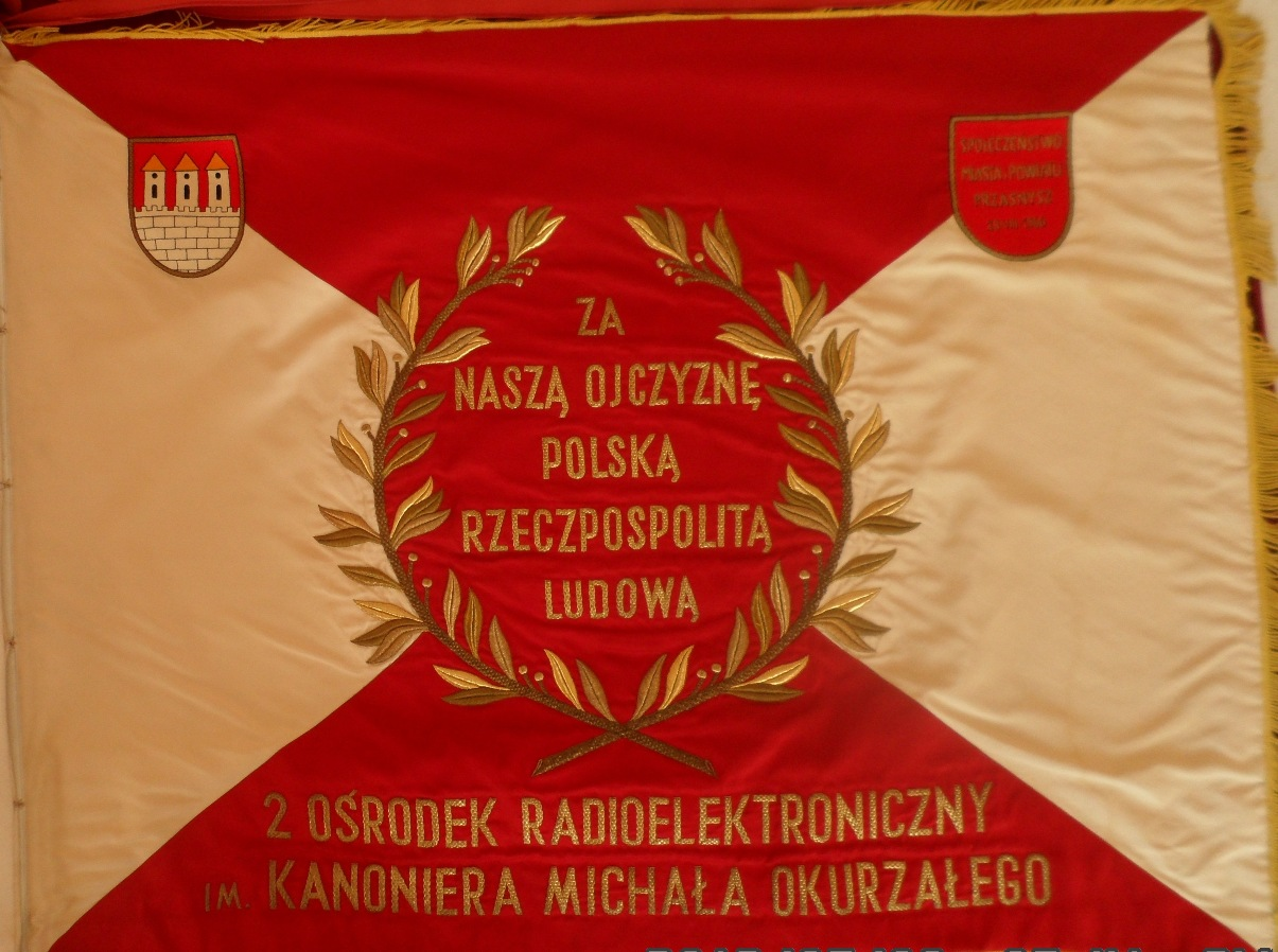 Garnizon Przasnysz, sala tradycji - sztandar 2 Ośrodka Radioelektronicznego im. kanoniera Michała Okurzałego